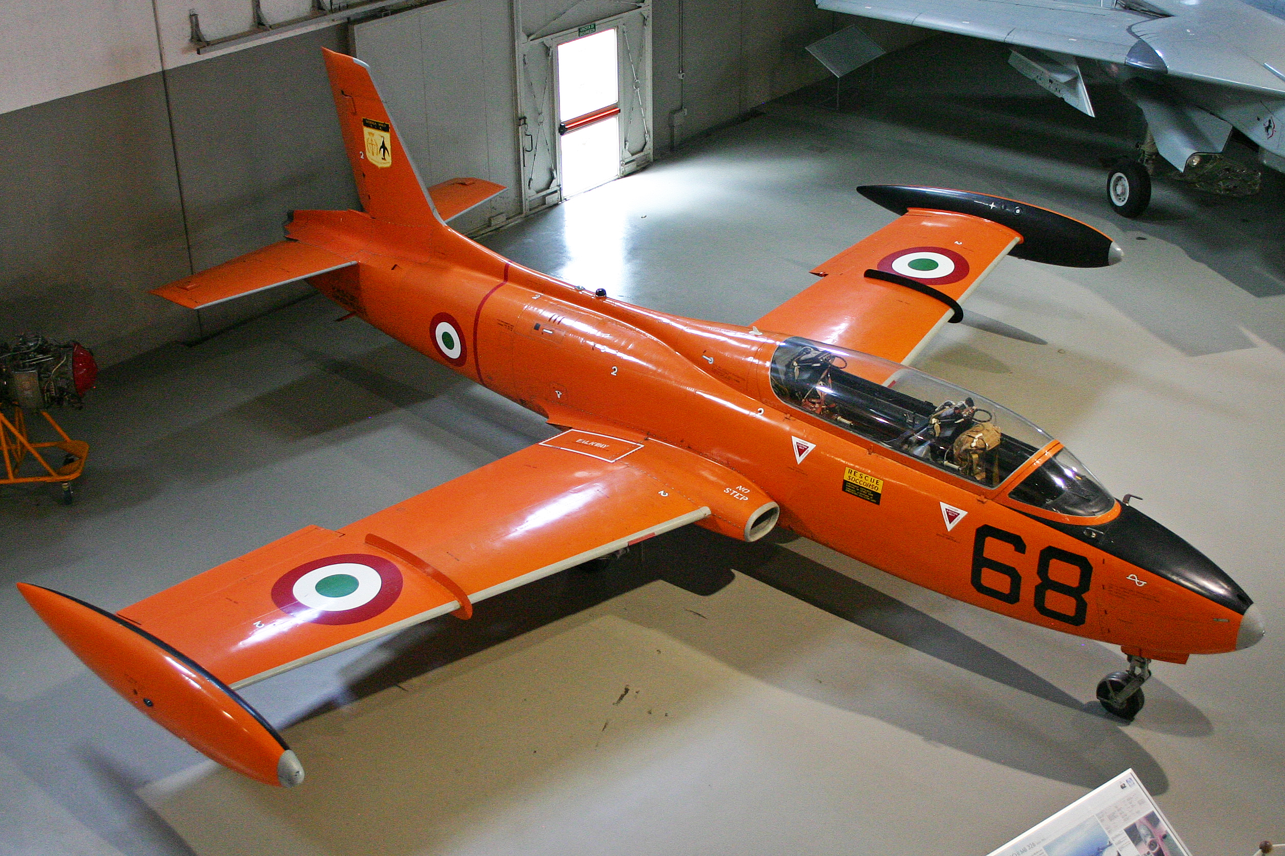 Displayed in Hangar SKEMA. msn 6502, l/n 243